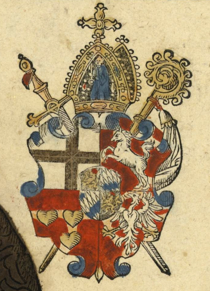 Detail aus: Contrafactur des Hochwurdigen Herrn Ernesti... (Bildnis der Erzbischofs Ernst von Bayern), Holzschnitt und Typendruck, koloriert; 300 x 185 mm (Blatt) Coburg, Kunstsammlungen der Veste Coburg, Inventar-Nr. XIII,1,21, Mappe 4, Passepartout 13